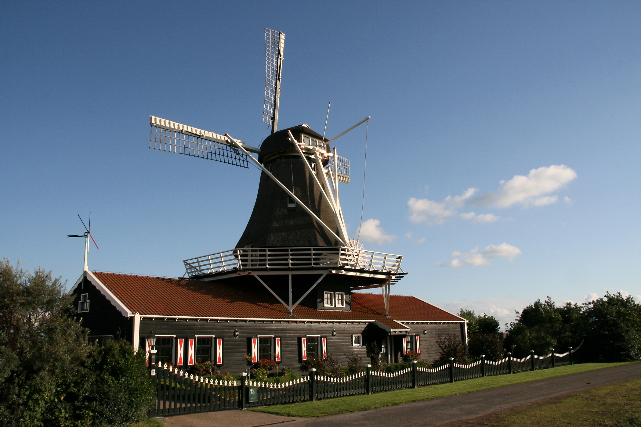 Anna Paulowna: Molen Leonide